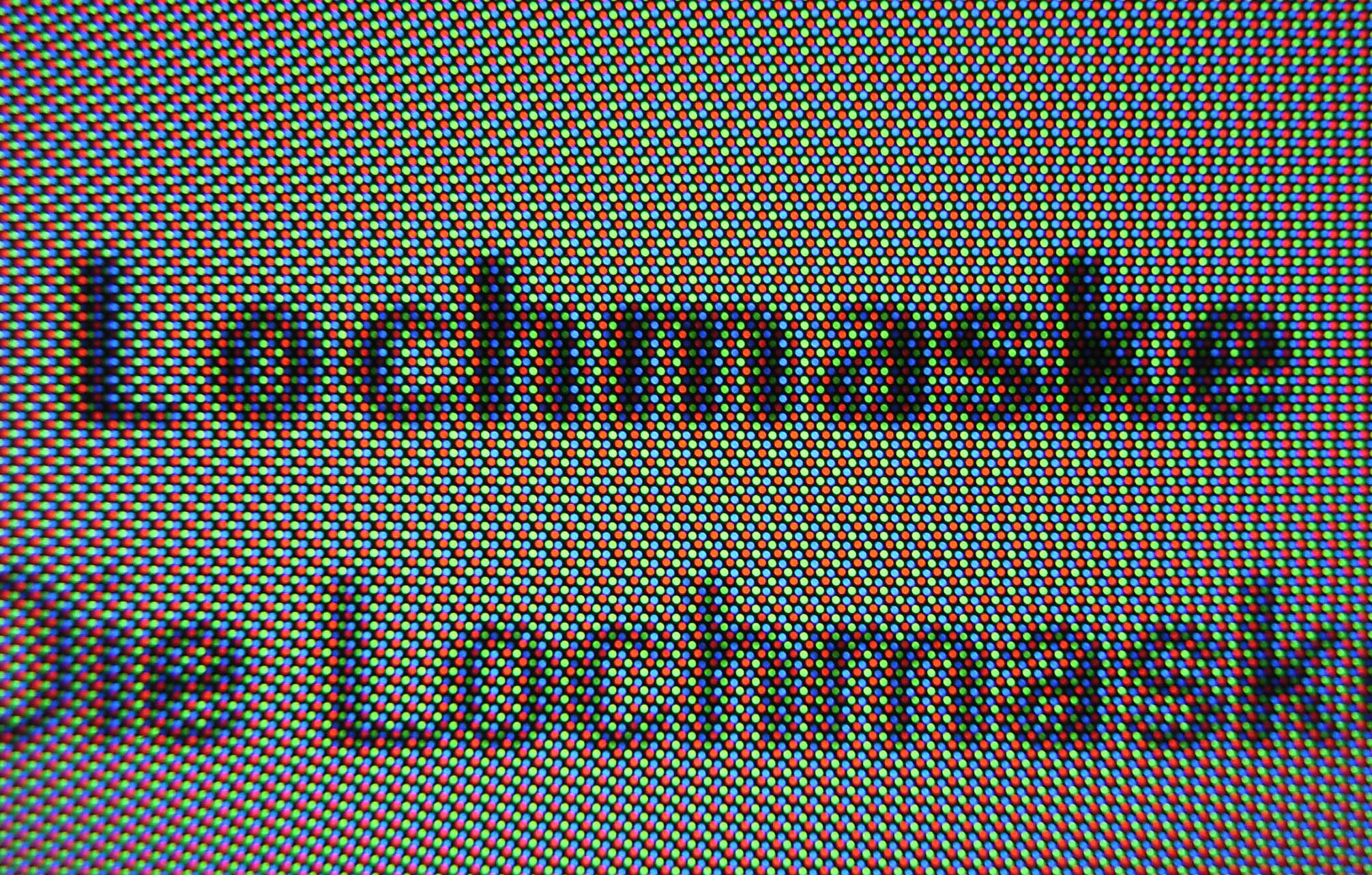 Das Foto wurde im Makromodus mit einer Ricoh Caplio RZ1 aufgenommen. Das ganze passierte im Abstand von etwa 1cm zum Bildschirm